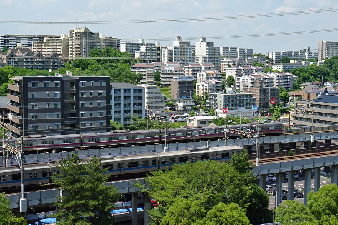 多摩ニュータウンを走る京王相模原線と小田急多摩線 - 多摩市落合にて（2015年6月24日撮影）